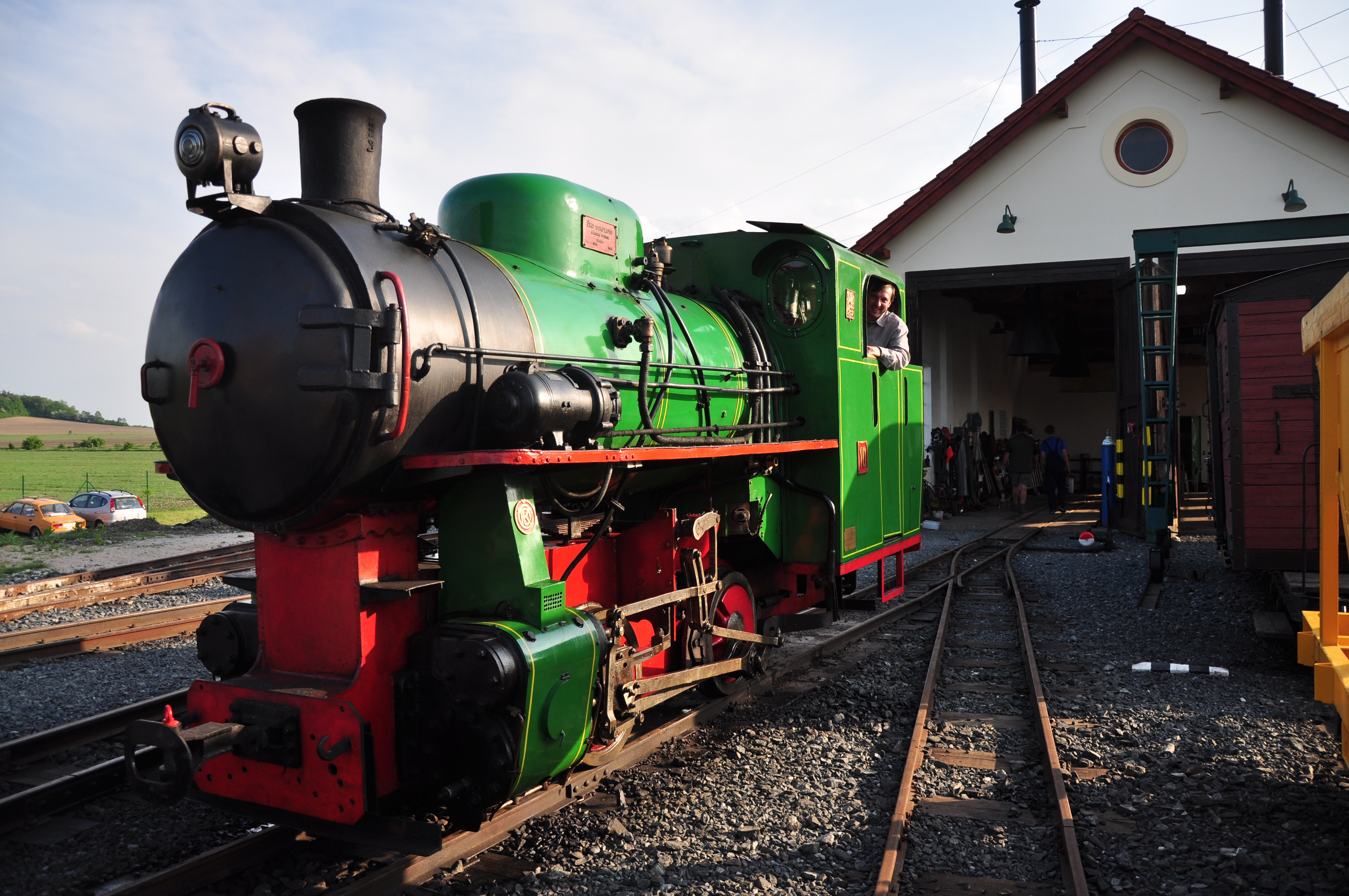 Parní lokomotiva Kolínské řepařské drážky (Kolín-Sedražice).